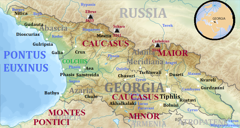 Physica Georgiae tabula